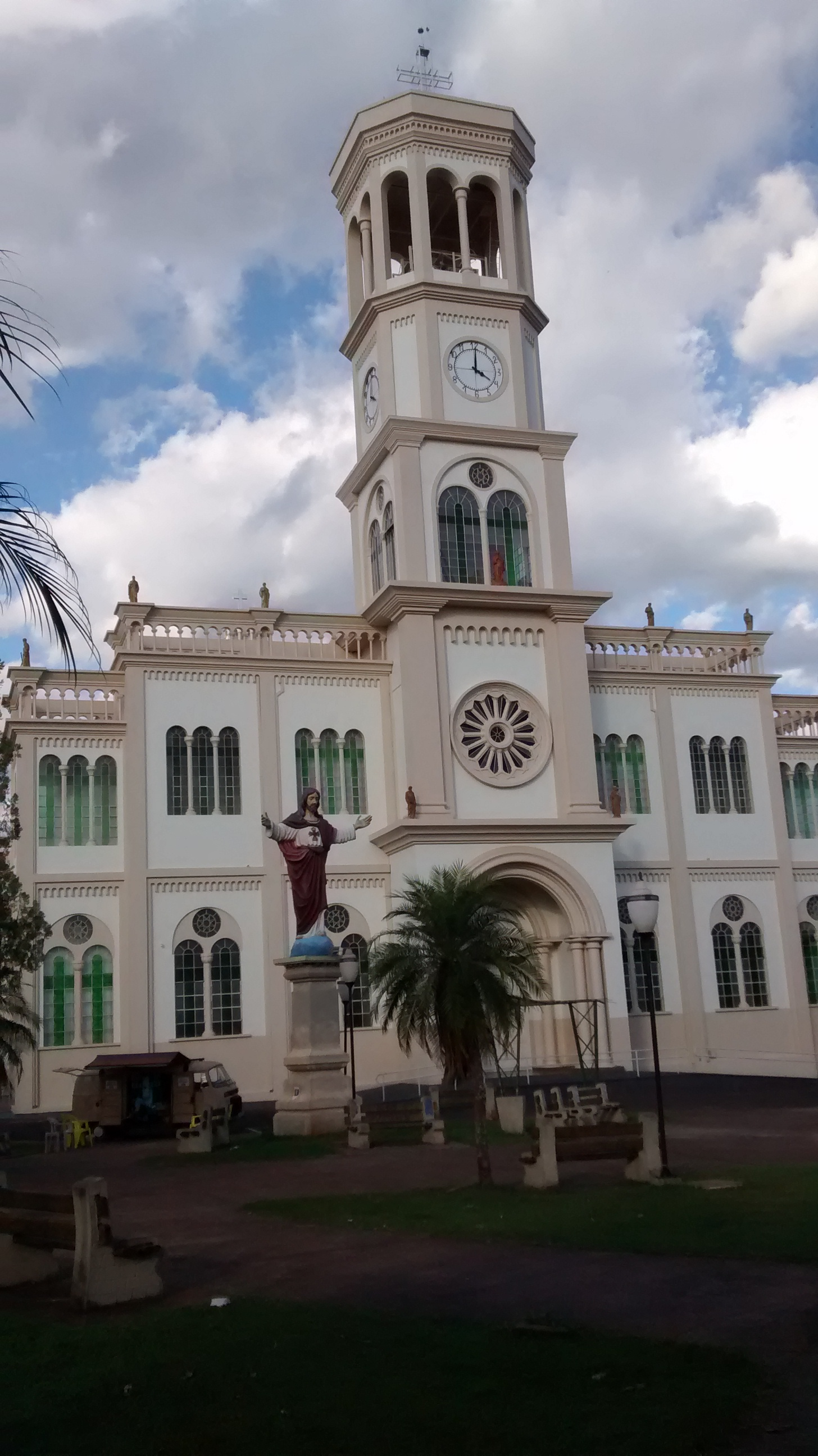 Catedral de Assis